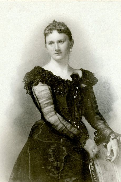 Luise Greger (1862-1944), deutsche Pianistin, Komponistin und Sängerin